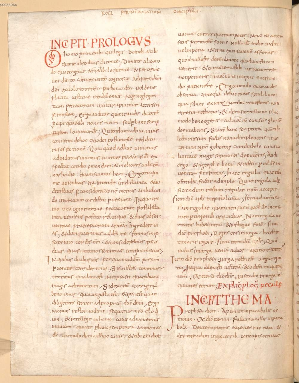 Początek "Reguły Mistrza" w rękopisie z pierwszej połowy IX wieku. Bayerischen Staatsbibliothek, Monachium, sygnatura BSB Clm 28118